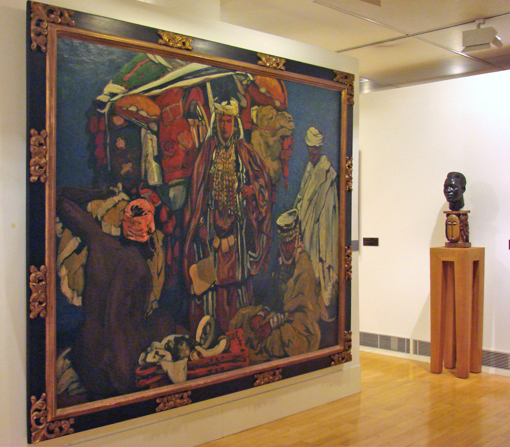 L'ORIENTALISME Loin du romantisme de du XIXe siècle, l'art orientaliste des années 20 et 30 s'attache à représenter les peuples et les individus avec un regard d'ethnologue. La Mission Dakar-Djibouti de Marcel Griaule et Michel Leiris en 1931, la Croisière Noire et la Croisière Jaune organisé par Citroën, illustrent bien cette nouvelle vision. Enfin, à travers les artistes représentés dans ses salles, le Musée évoque l'Exposition Coloniale de 1931, qui attire alors plus de 30 millions de visiteurs. Musée des Années 30 - Espace Landowski